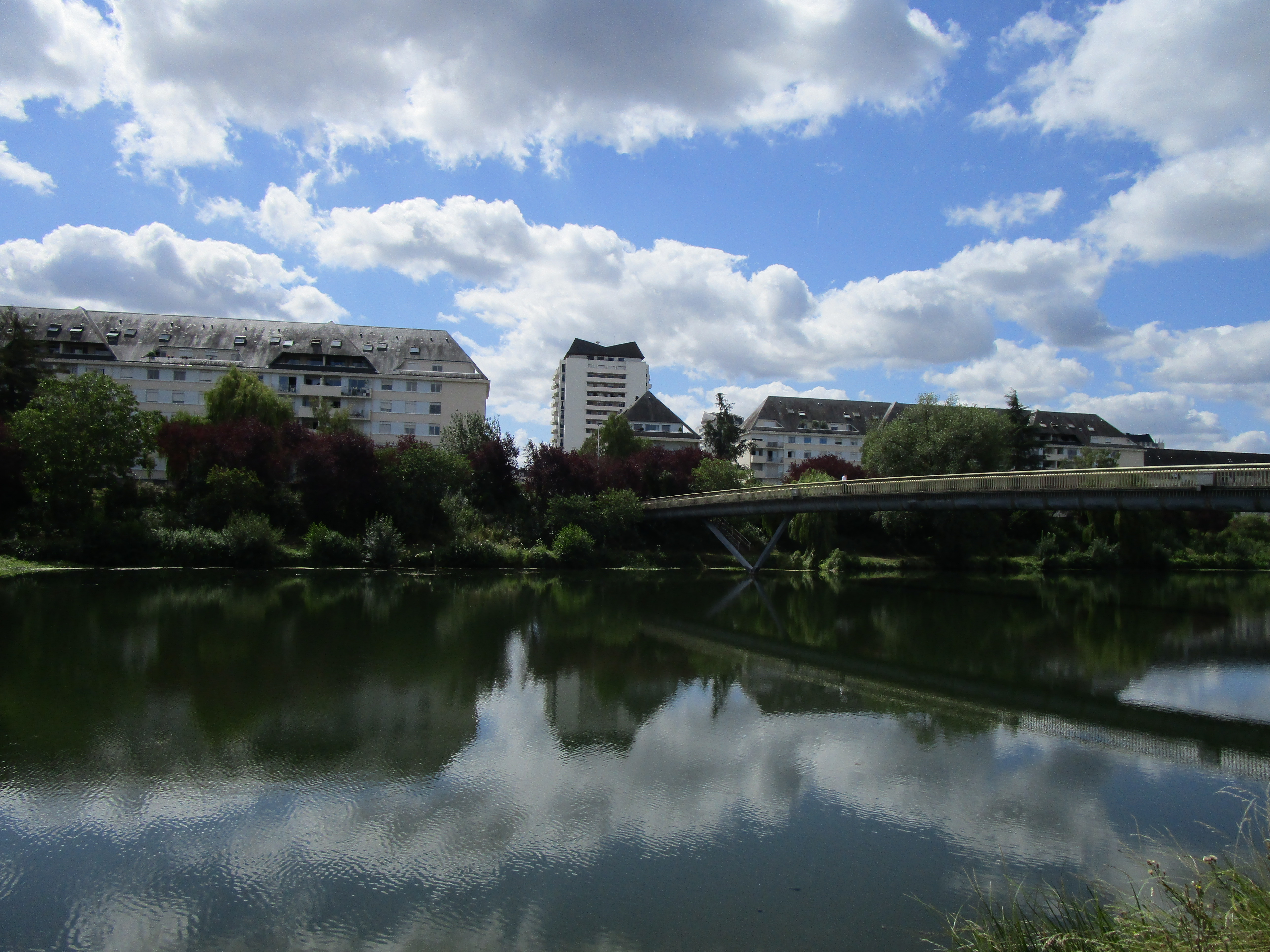 La partie nord du quartier des Fontaines et le Cher, vue depuis le parc Honoré de Balzac.